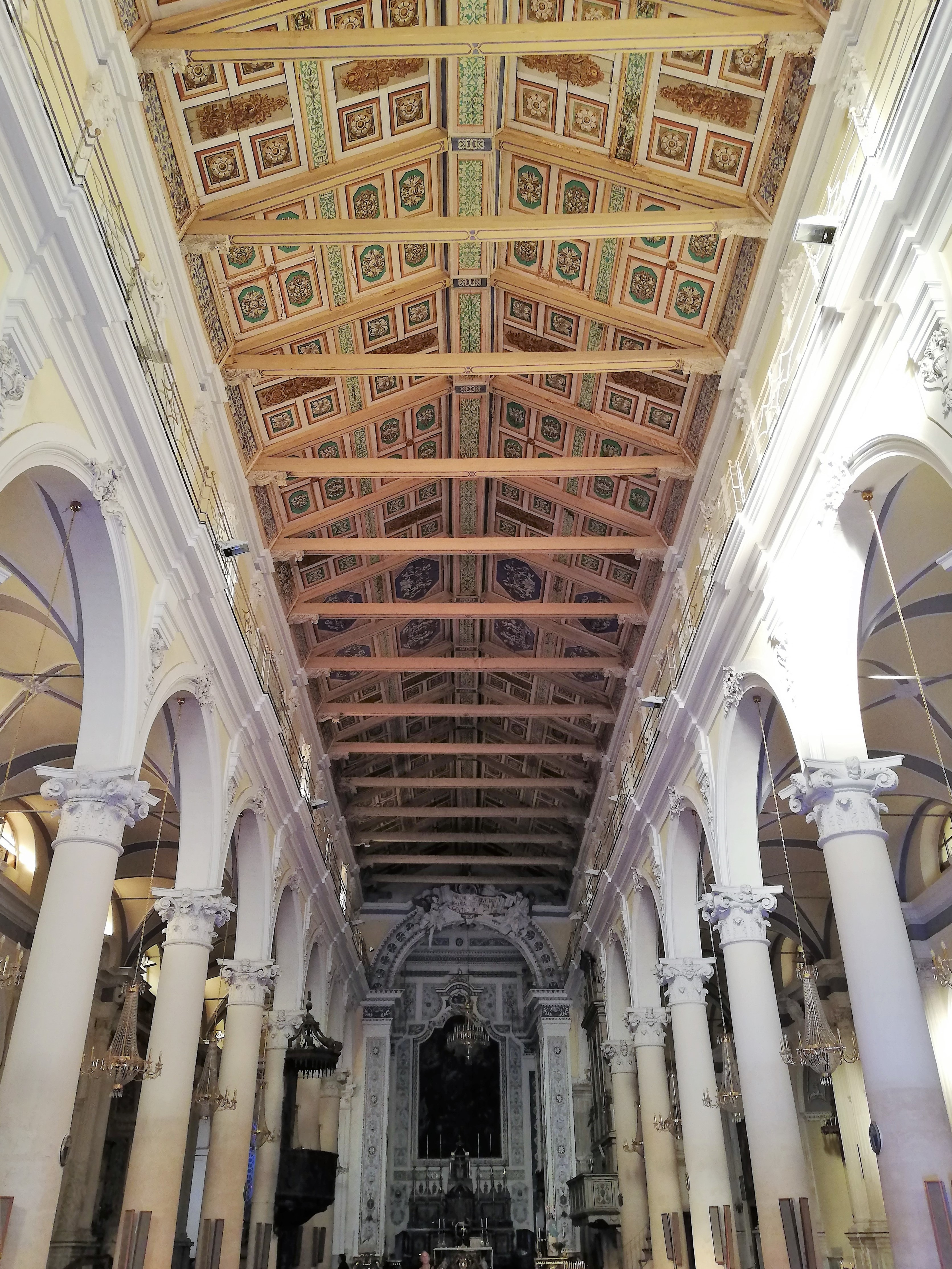 Tetto ligneo.